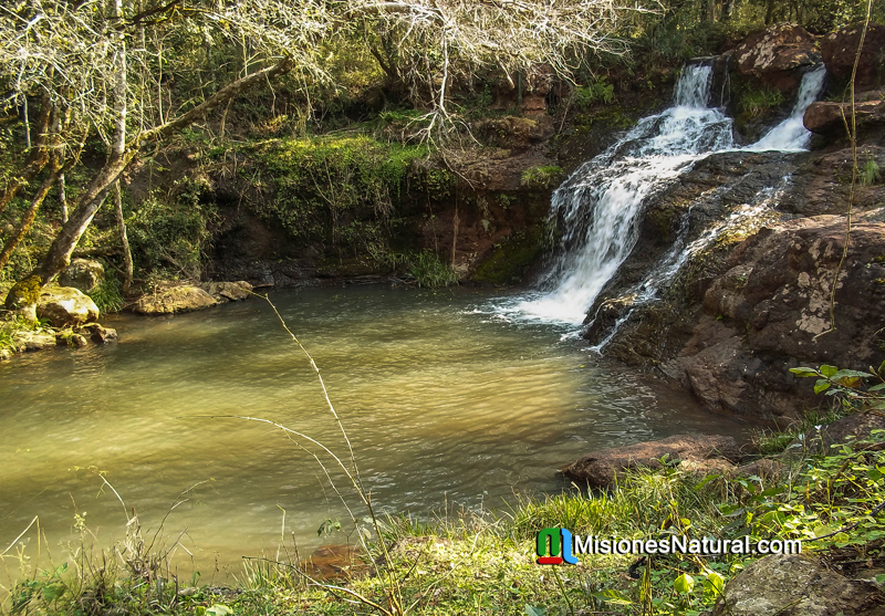 Salto Lucia en la localidad de Gobernador Lopez